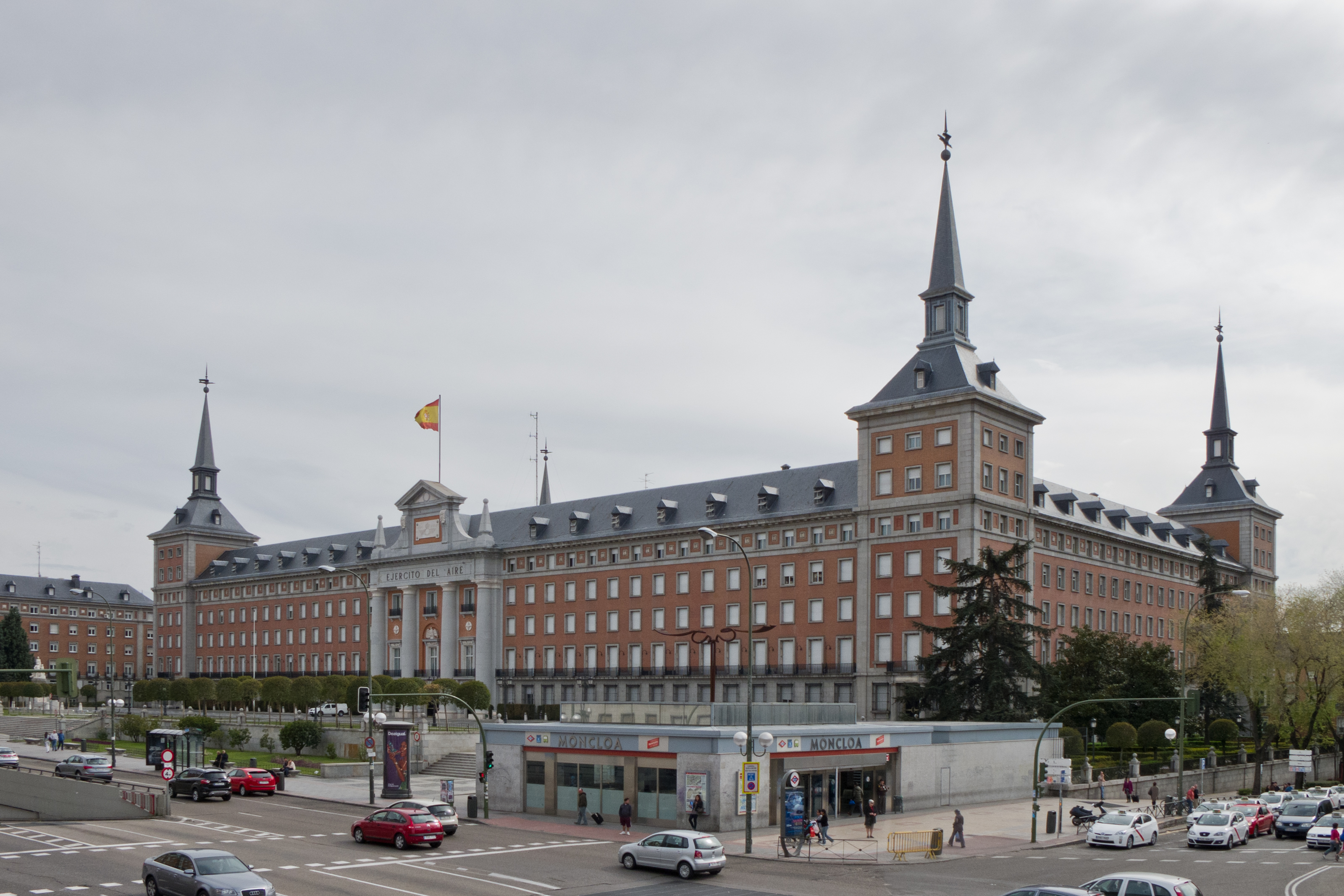 Cuartel General del Ejército del Aire de España, Madrid, España.